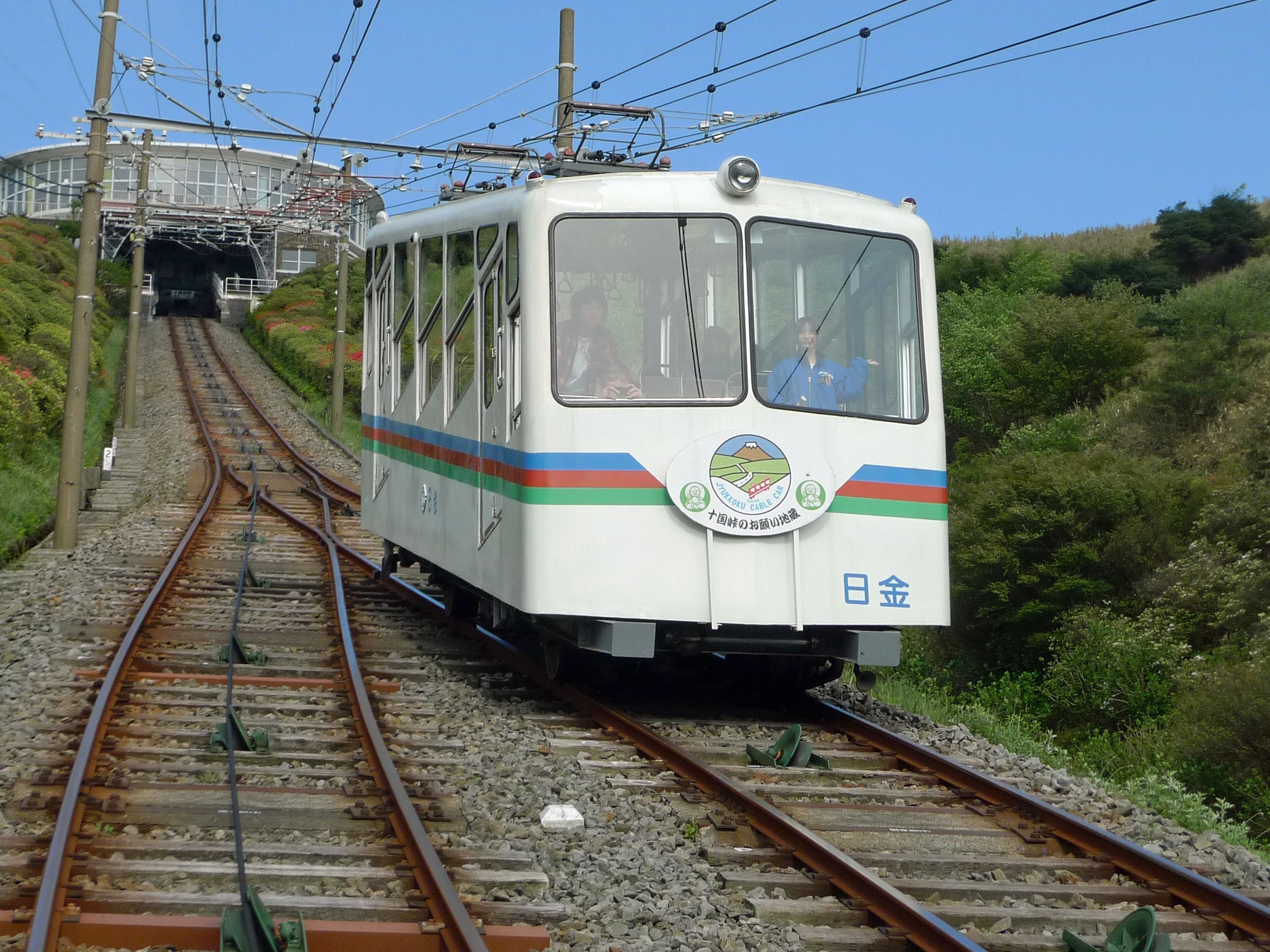 伊豆箱根鉄道十国鋼索線の車両